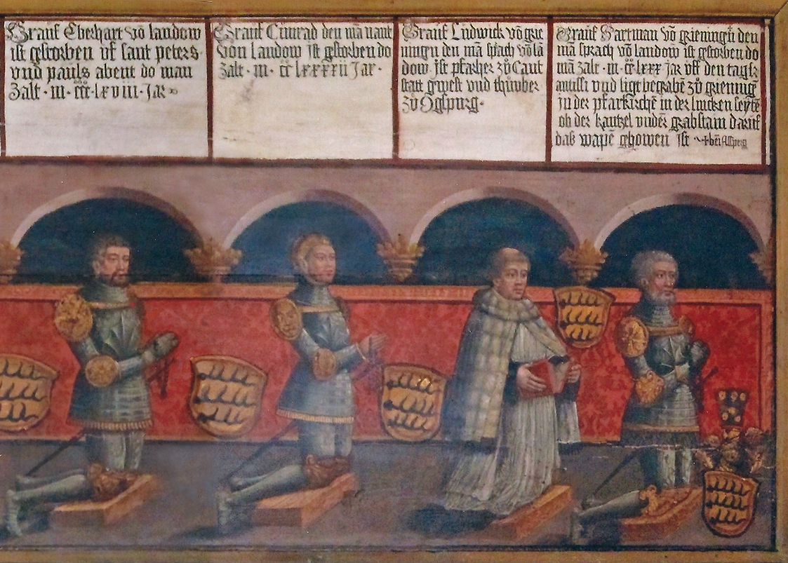 Grafen Hartmann und Ludwig von Grüningen, Konrad und Eberhard von Landau (von rechts nach links). Ausschnitt aus einer Ahnengalerie (um 1540) im Kreuzgang von Kloster Heiligkreuztal